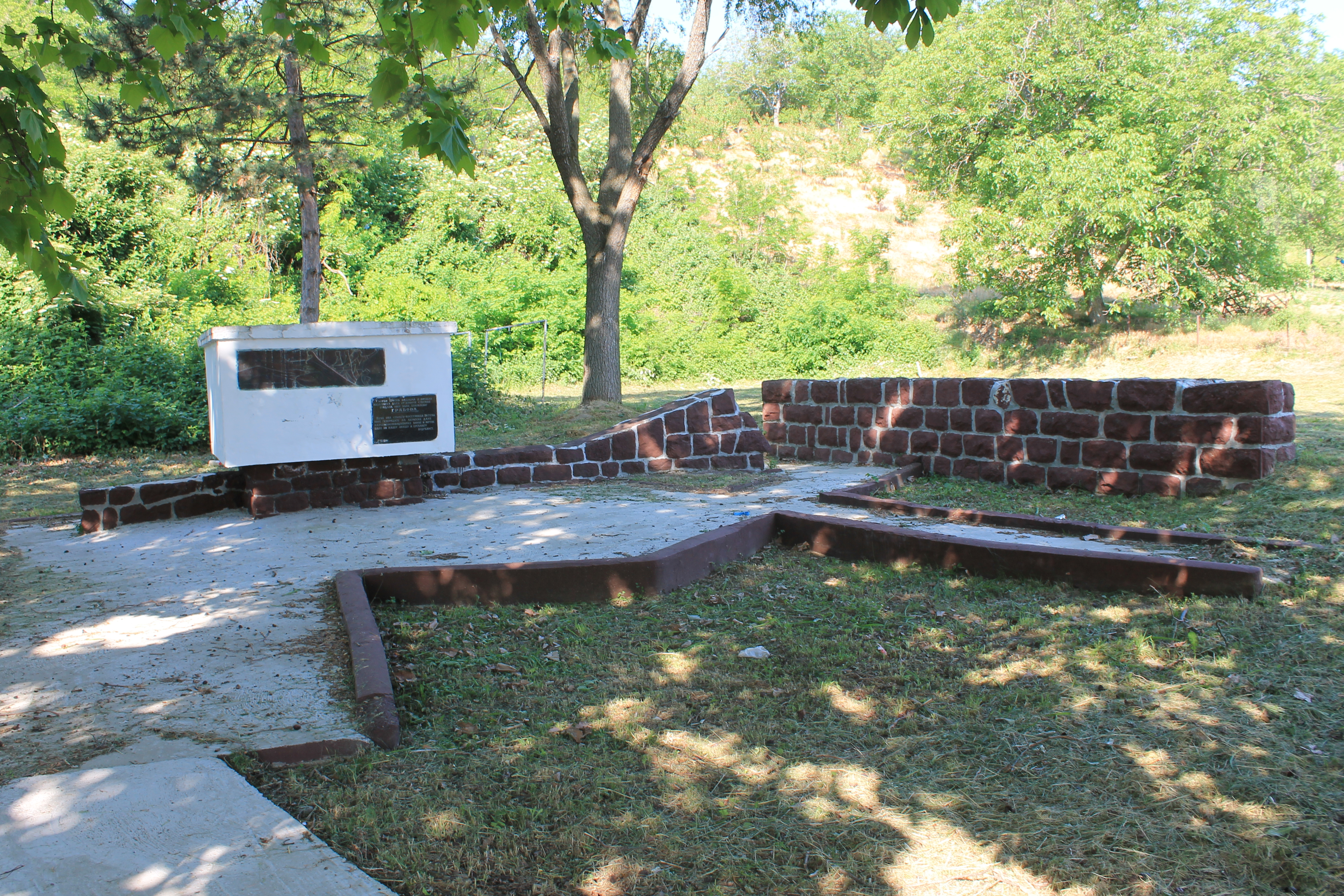 Grabovo, spomenik NOB-a